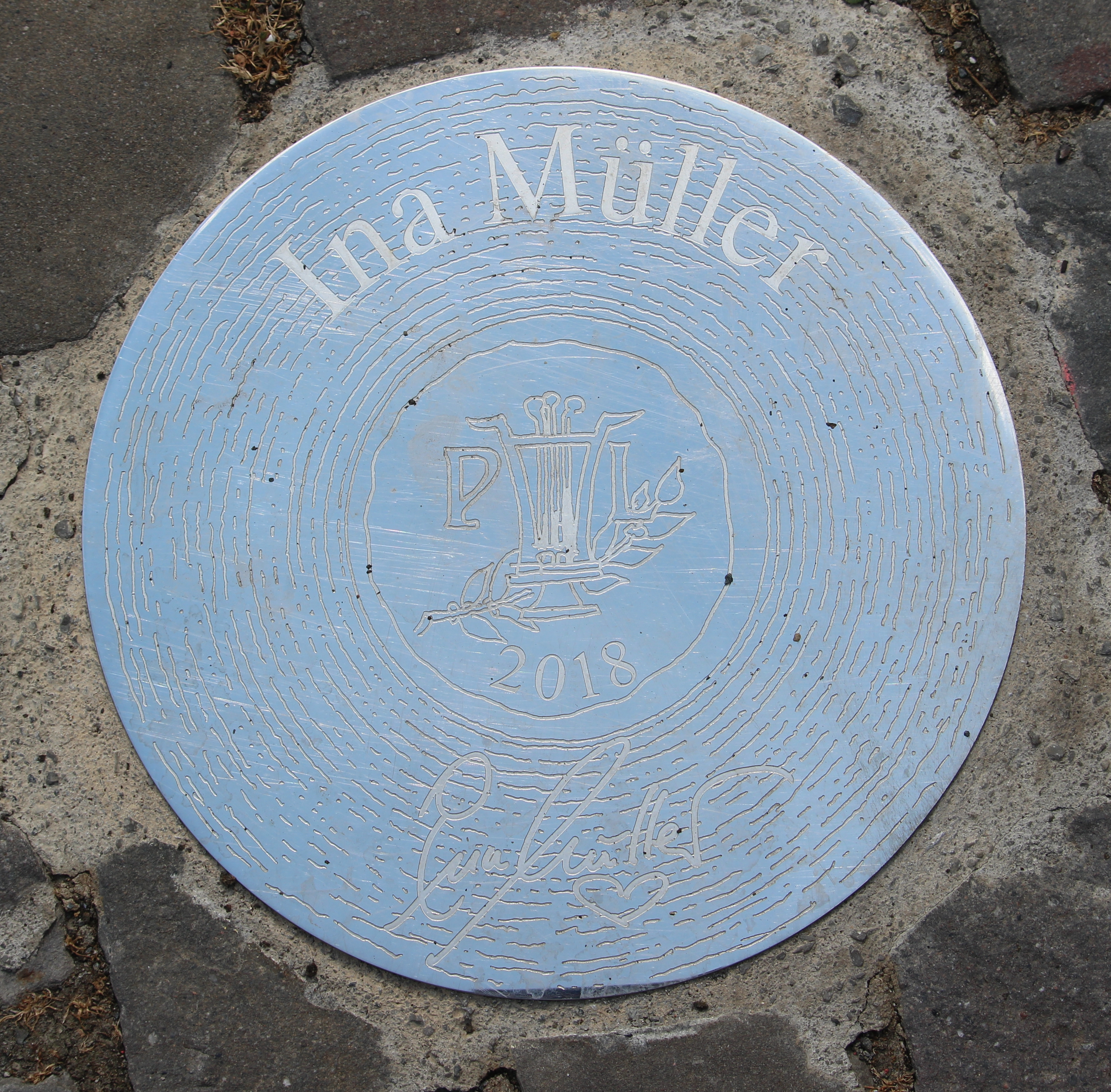 Plakette im Boden des Paul-Lincke-Platz in Hahnenklee-Bockswiese. Verlegt anläßlich der Verleihung des Paul-Lincke-Rings an Ina Müller (2018).